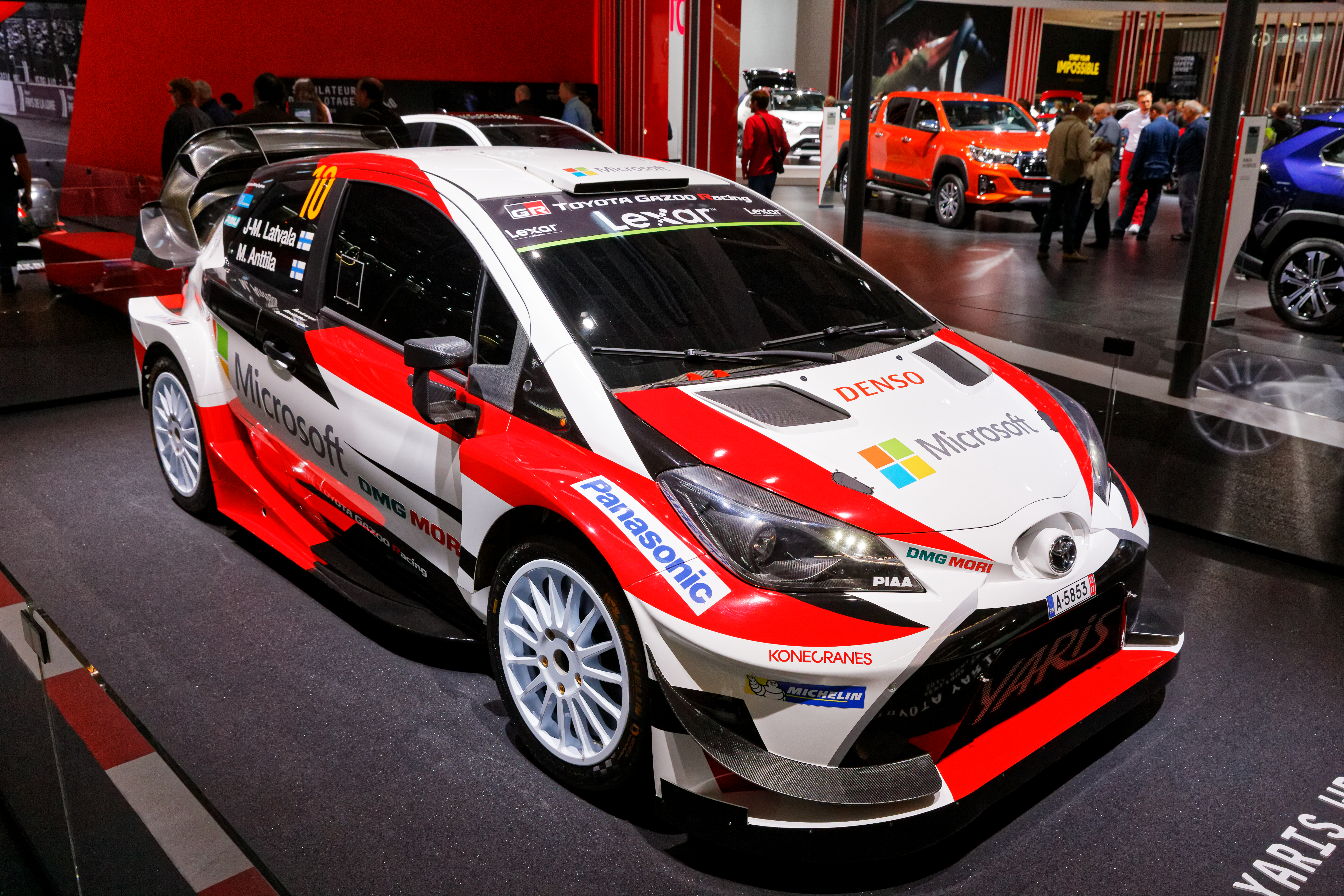 Une réplique de la Toyota Yaris WRC de 2017 pilotée par Jari-Matti Latvala exposée lors du mondial de l'automobile de Paris 2018.